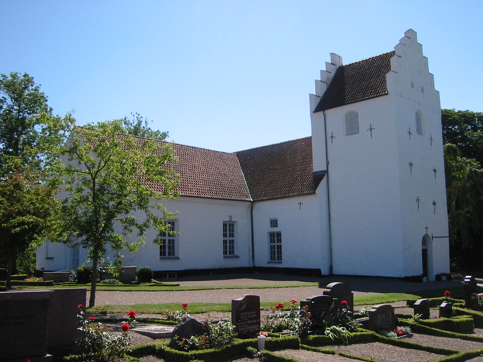 Kågeröds kyrka.